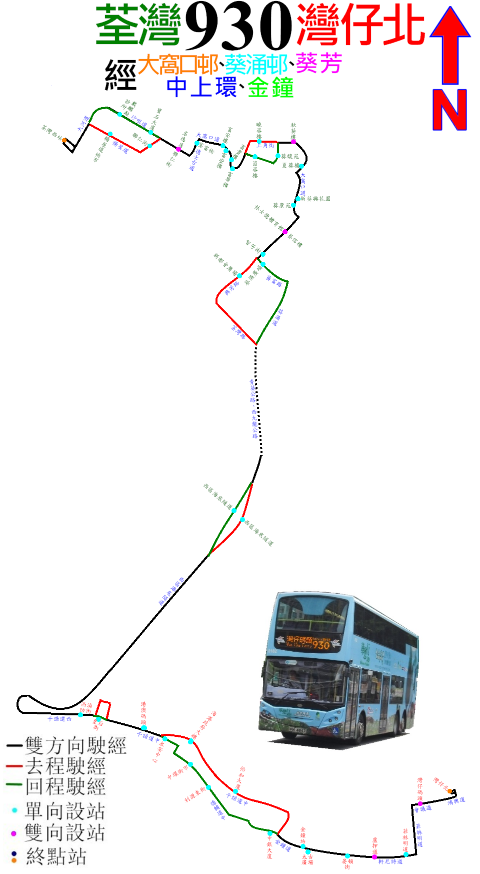 隧巴930線(荃灣西站為總站)的走線圖